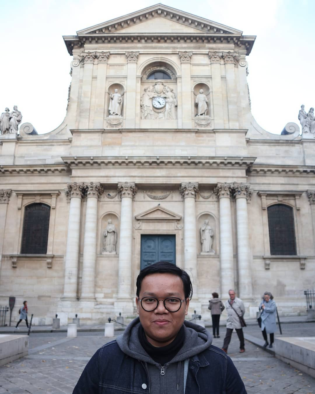 Lahir 3 Desember 1994. Kabupaten Bulumba, Sulawesi Selatan